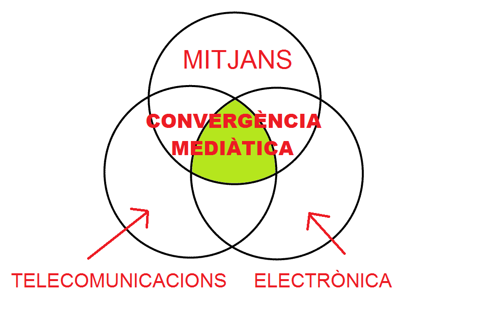 Diagrama convergència mediàtica: mitjans + telecomunicacions + electrònica